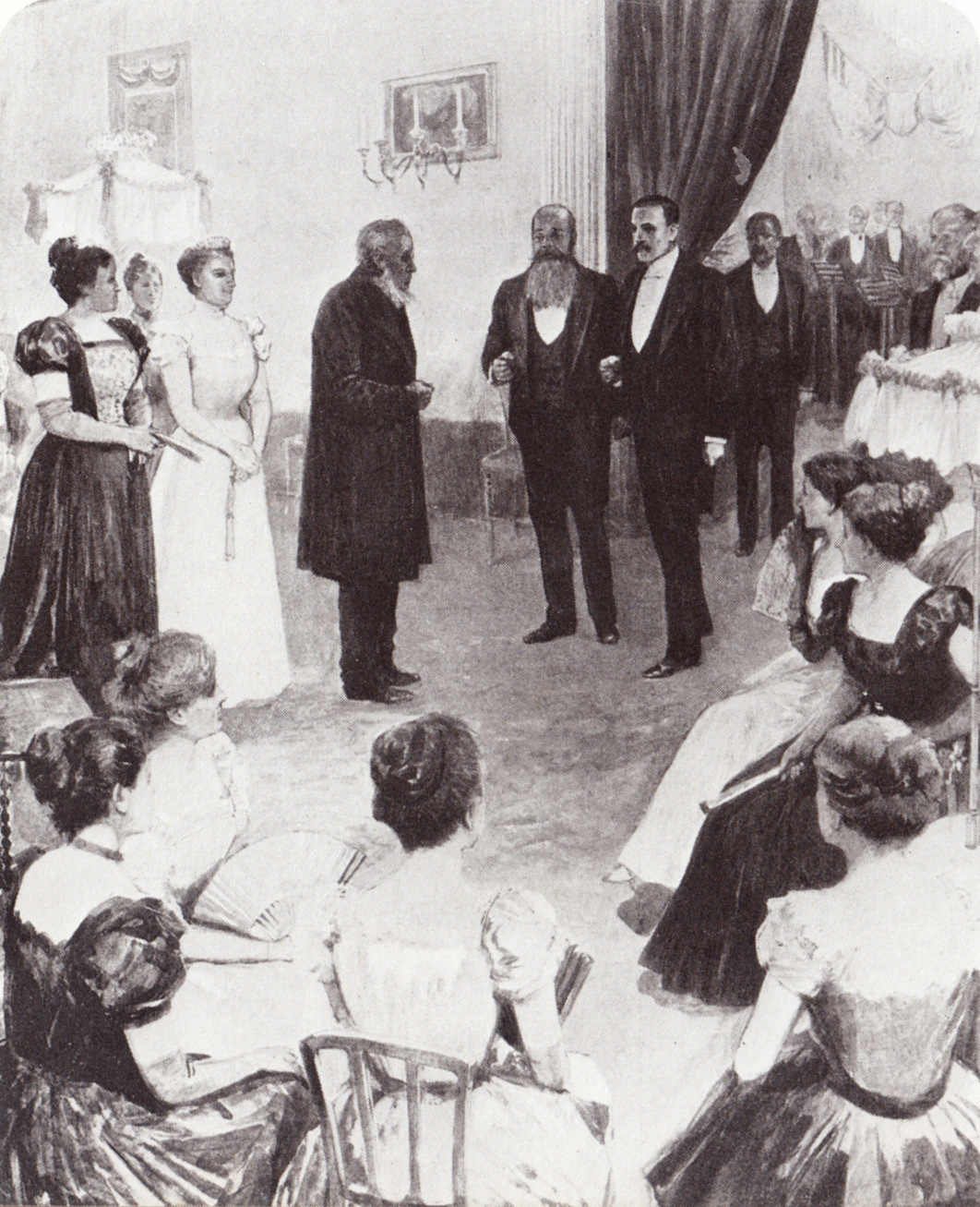 Paul Kruger en Alfred Milner beraadslaag in Bloemfontein op die vooraand van die Suid-Afrikaanse Oorlog